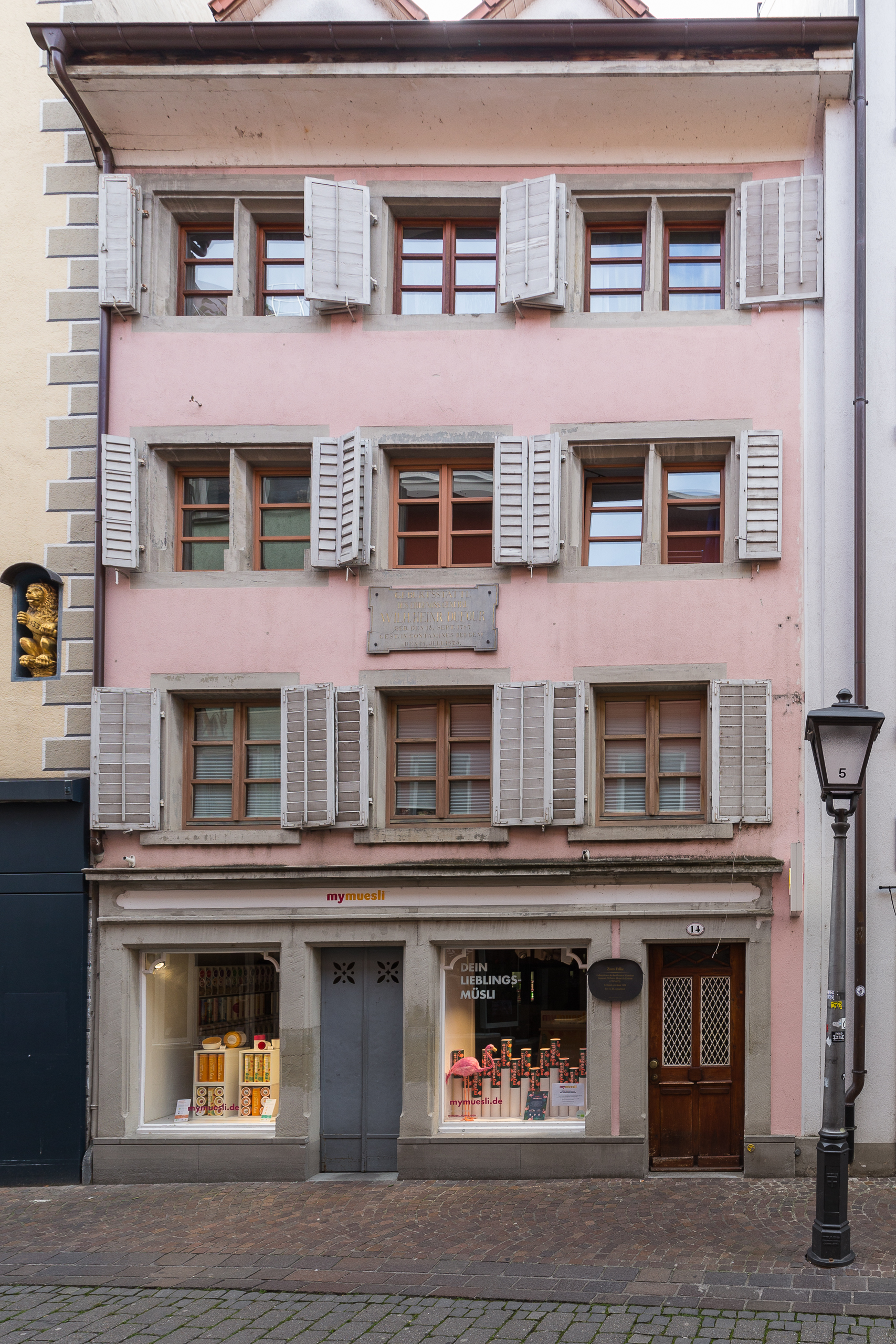 "Zum Falke", Wessenbergstr. 14, Konstanz